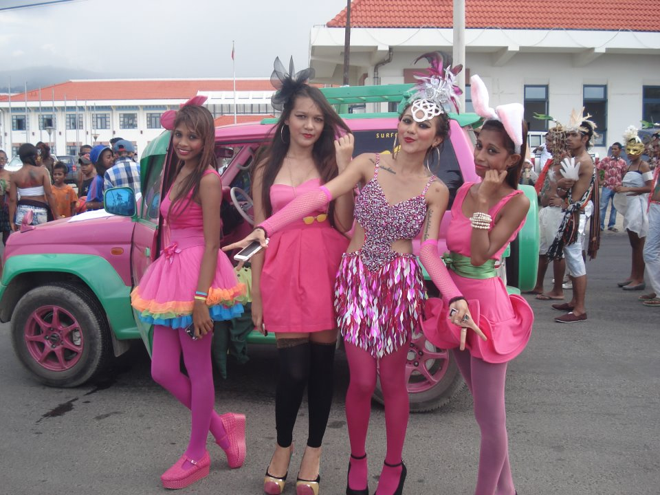 Carneval em Dili